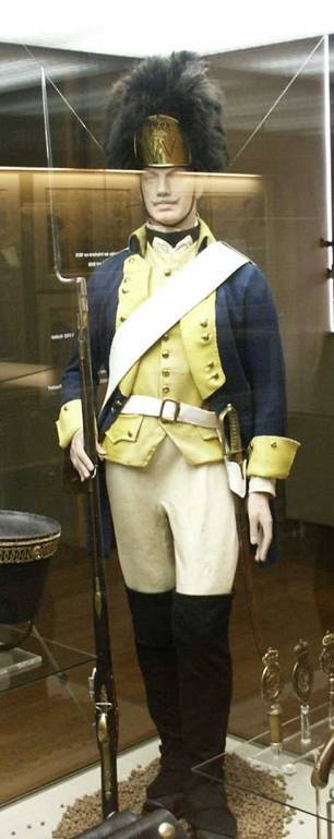 Grenadier-Regiment v. Augé 1767 (Originaluniform im Wehrgeschichtlichen Museum in Rastatt)